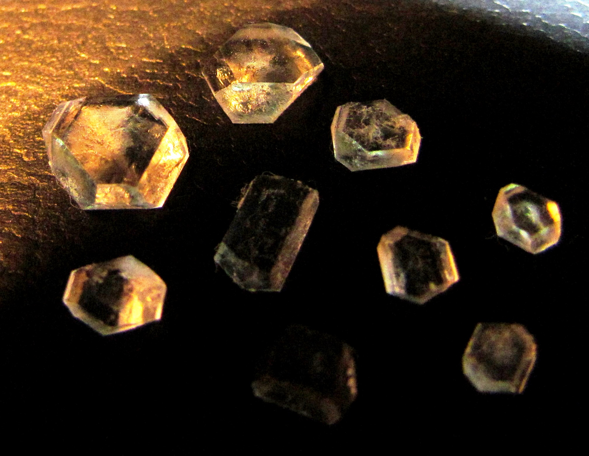 Citromsavoldatból kristályosított, különböző méretű citromsav-monokristályok (Budapest, Piarista Gimnázium)